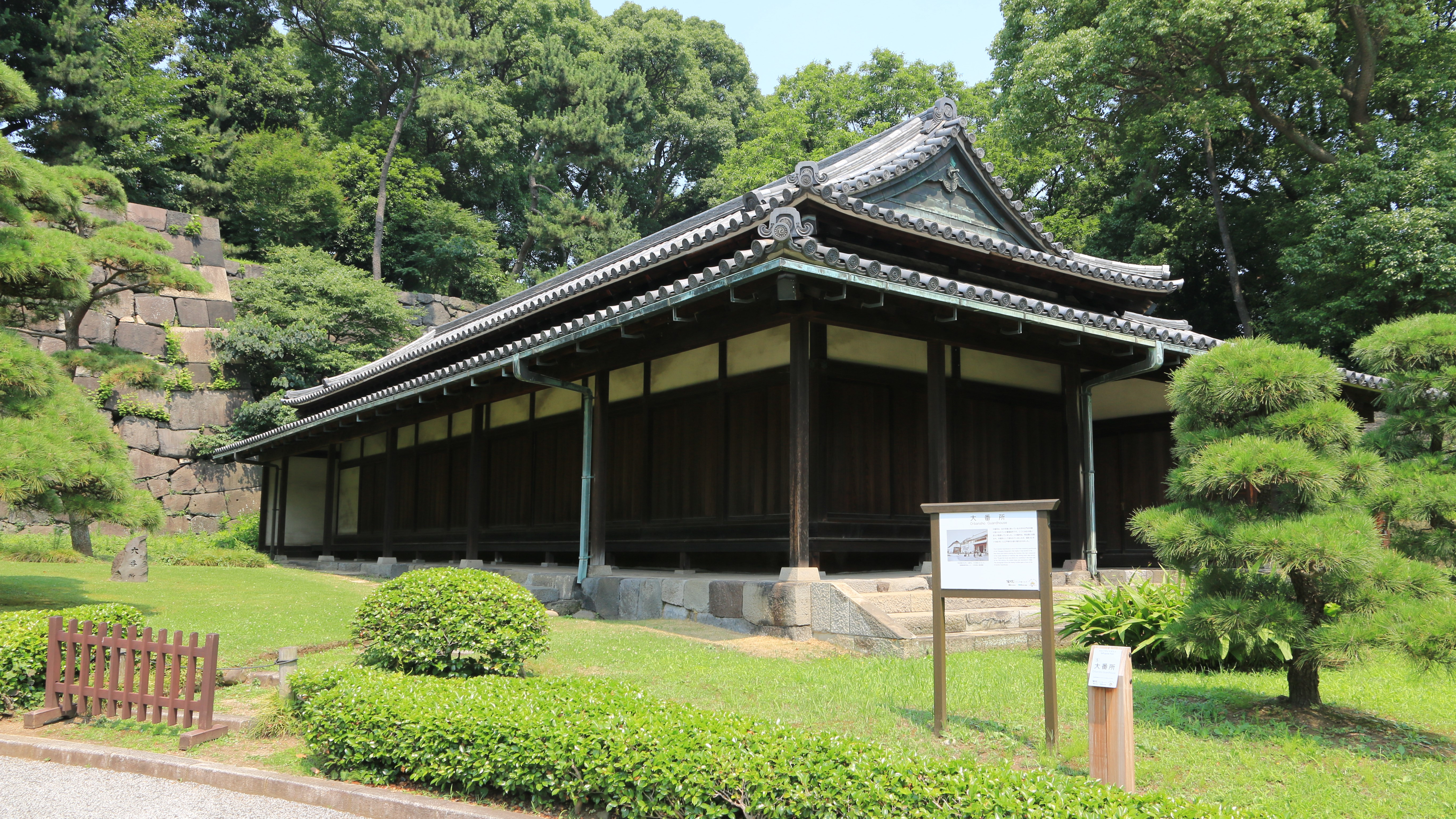 GUARD HOUSE IMPERIAL GARDEN TOKYO